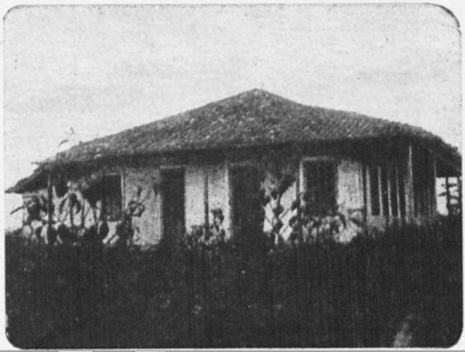 Casa natal do poeta Castro Alves, na Fazenda Cabaceiras, Curralinho.